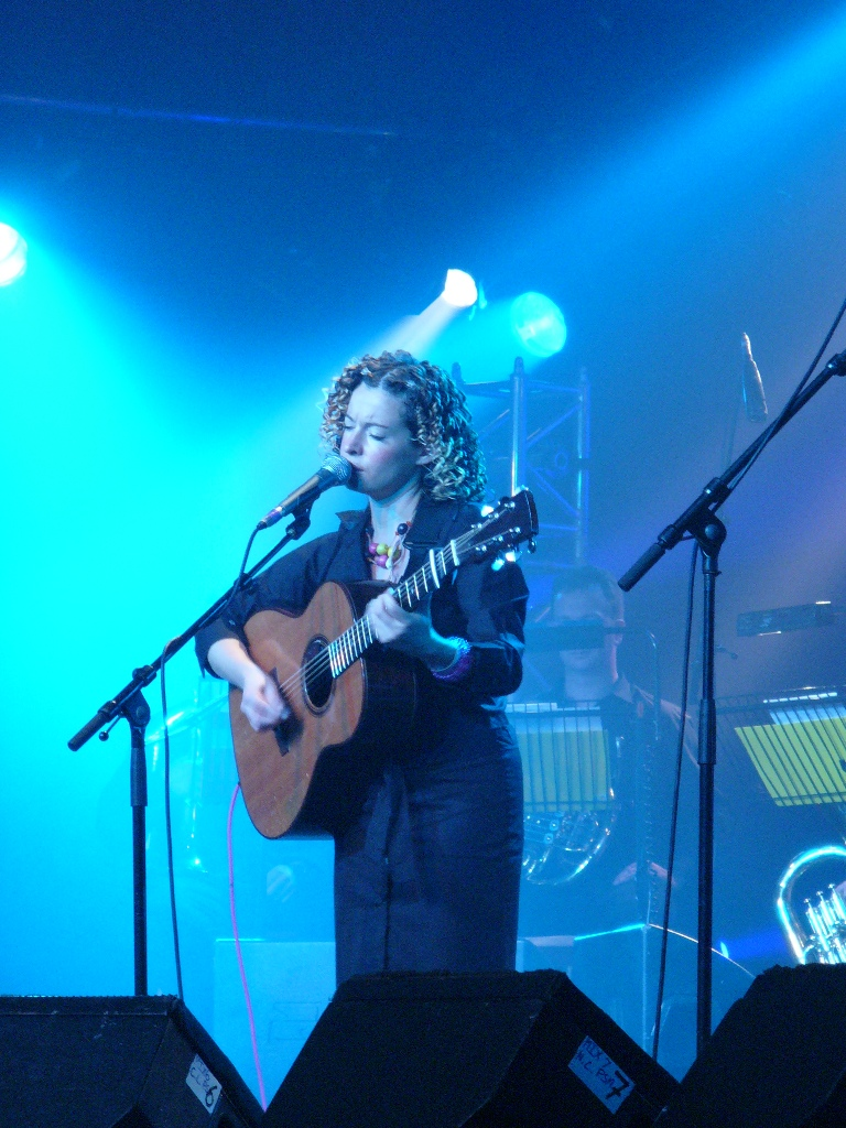 Kate Rusby